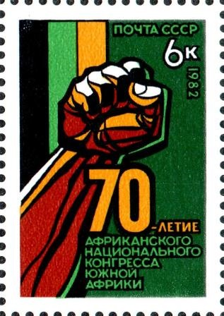 Почтовая марка СССР. 70-летие Африканского национального конгресса Южной Африки. Номер в каталоге ЦФА 5331